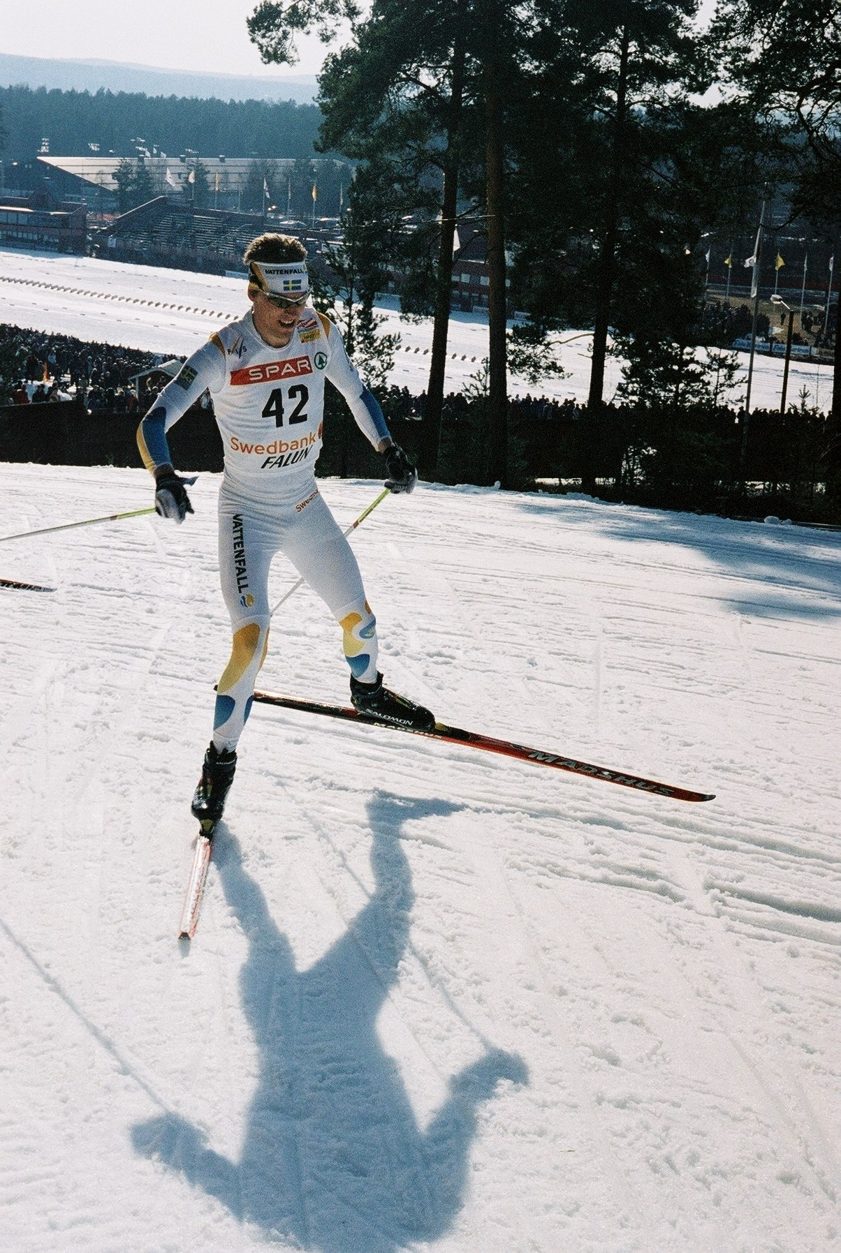 Johan Olsson, Svenska Skidspelen Falun 2007